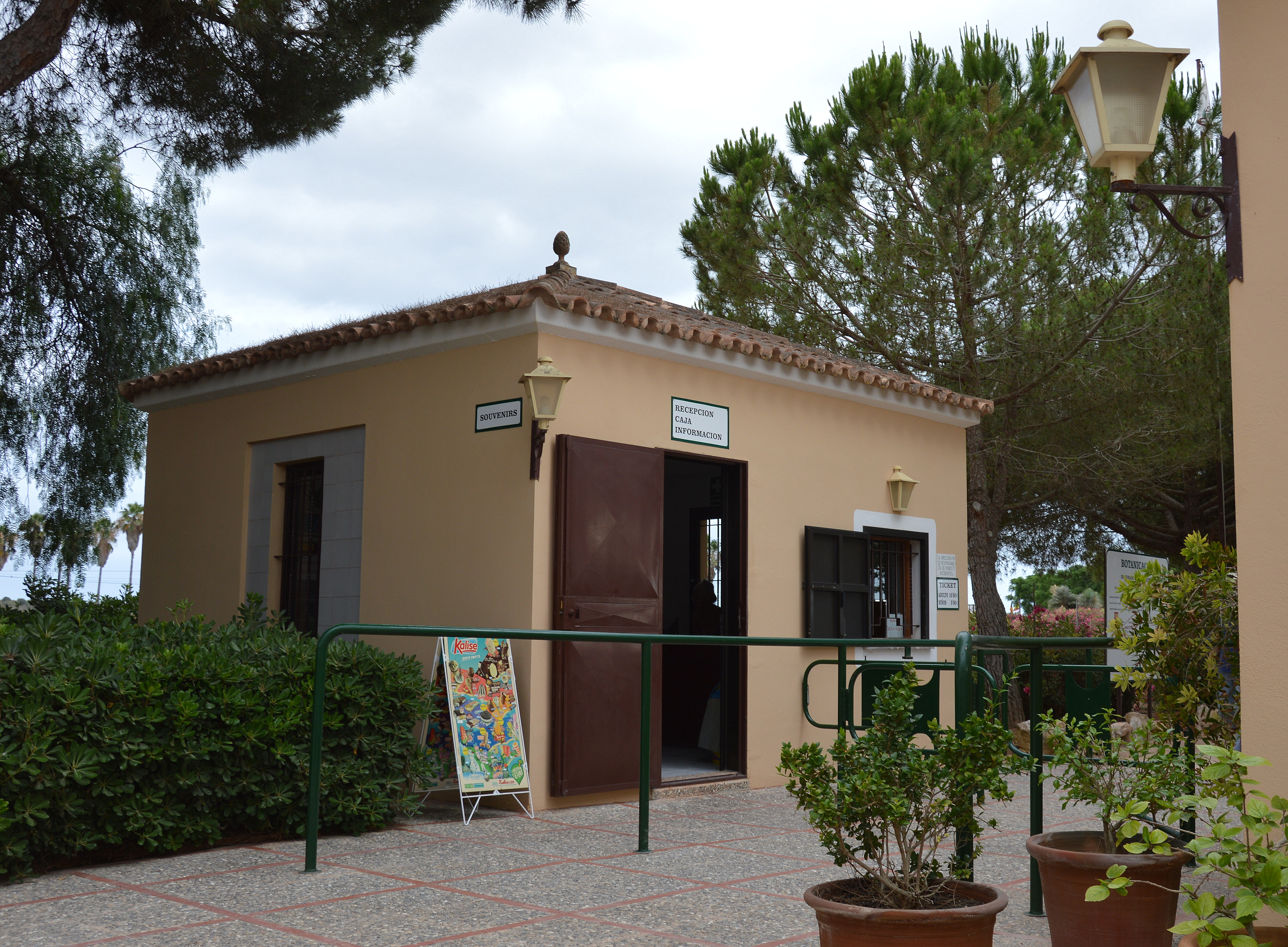 Eingangsbereich Botanicactus